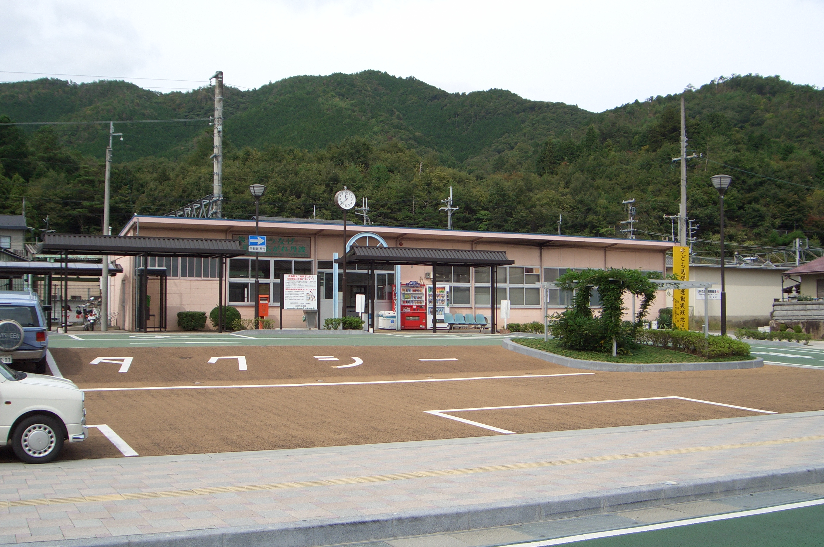 西日本旅客鉄道福知山線市島駅